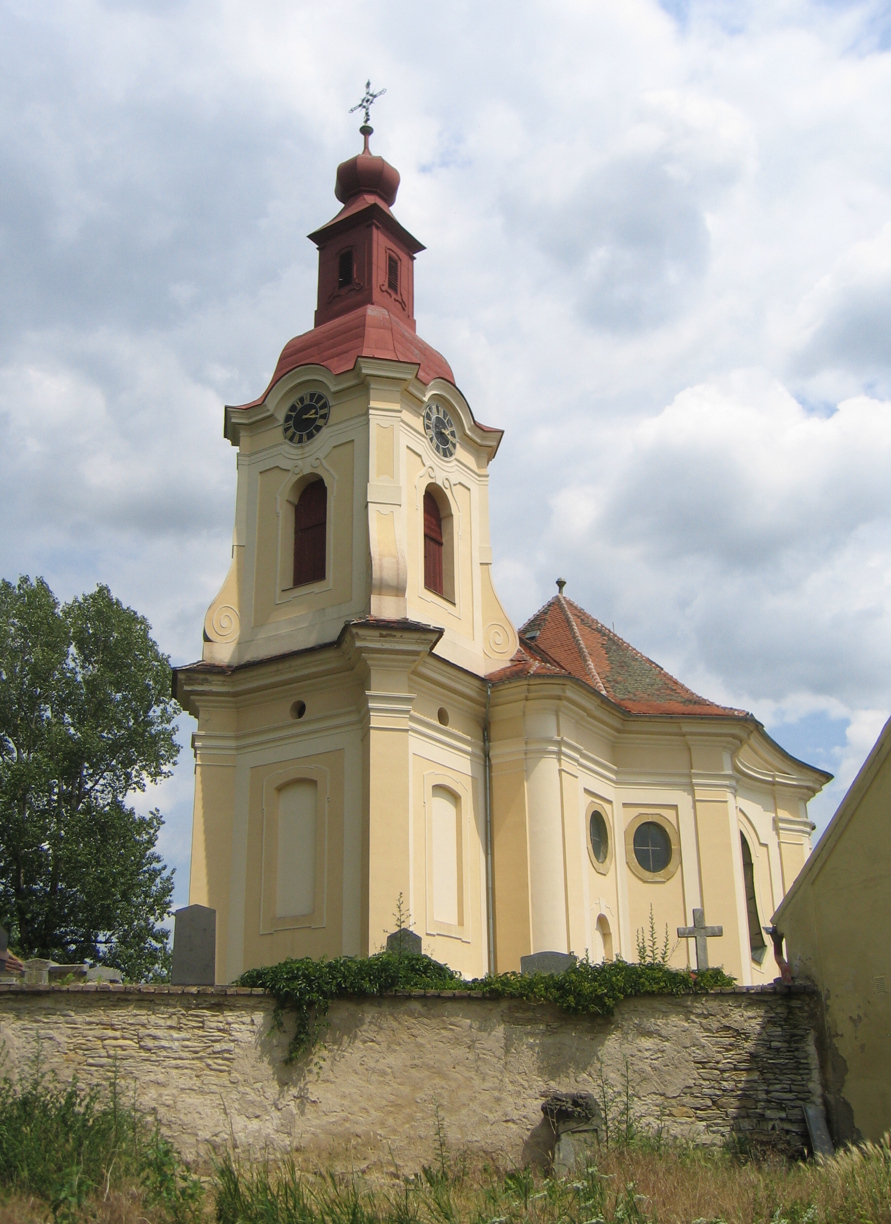 Kostel sv. Vojtěcha (Počaply), Počaply